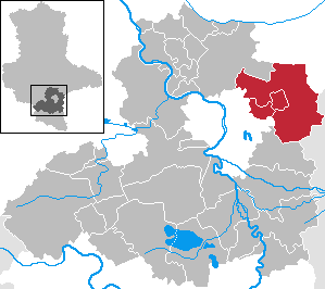 Verwaltungsgemeinschaft Östlicher Saalkreis in Sachsen-Anhalt - Saalekreis